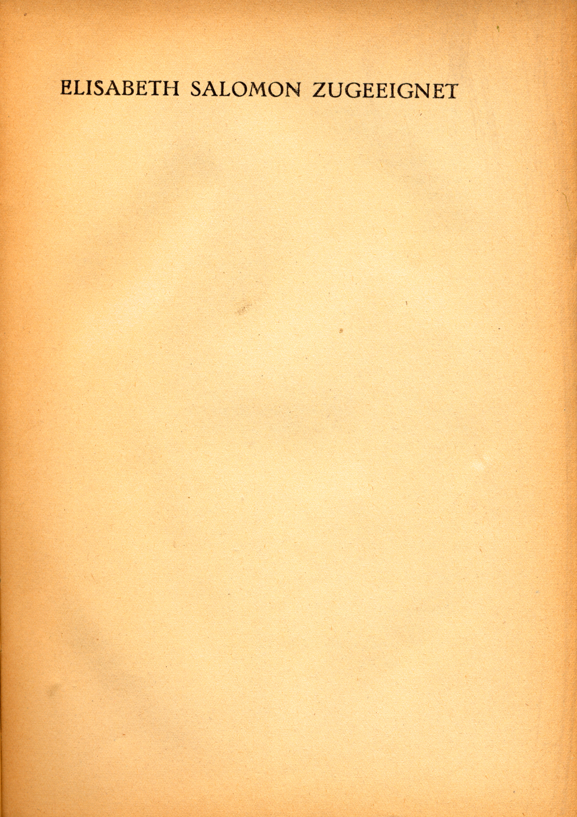 Widmung "Elisabeth Salomon zugeeignet" Friedrich Gundolf "Heinrich von Kleist", Berlin 1922, Verlag Georg Bondi